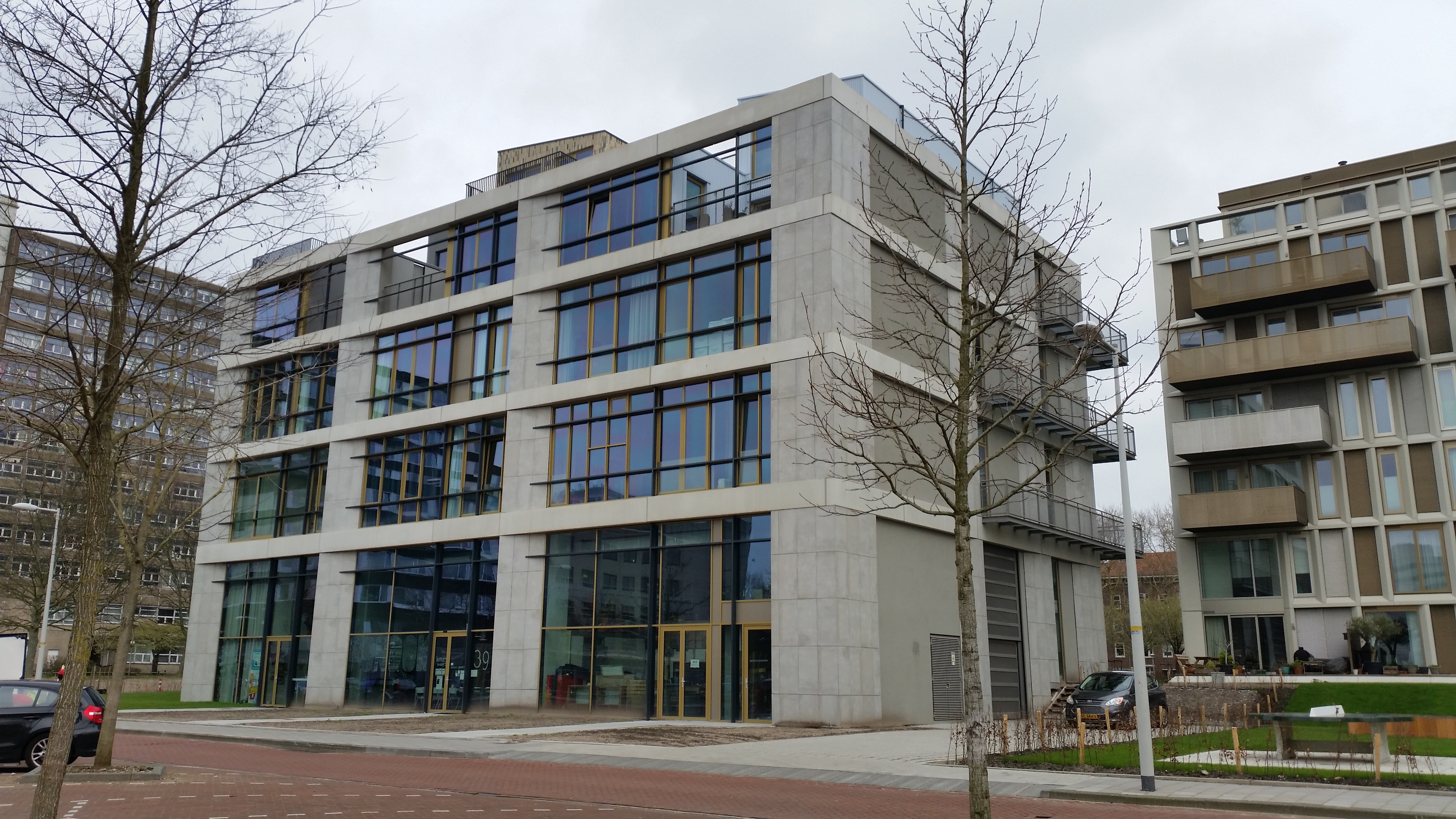 Pondok aan Poeldijkstraat 369-399, Amsterdam